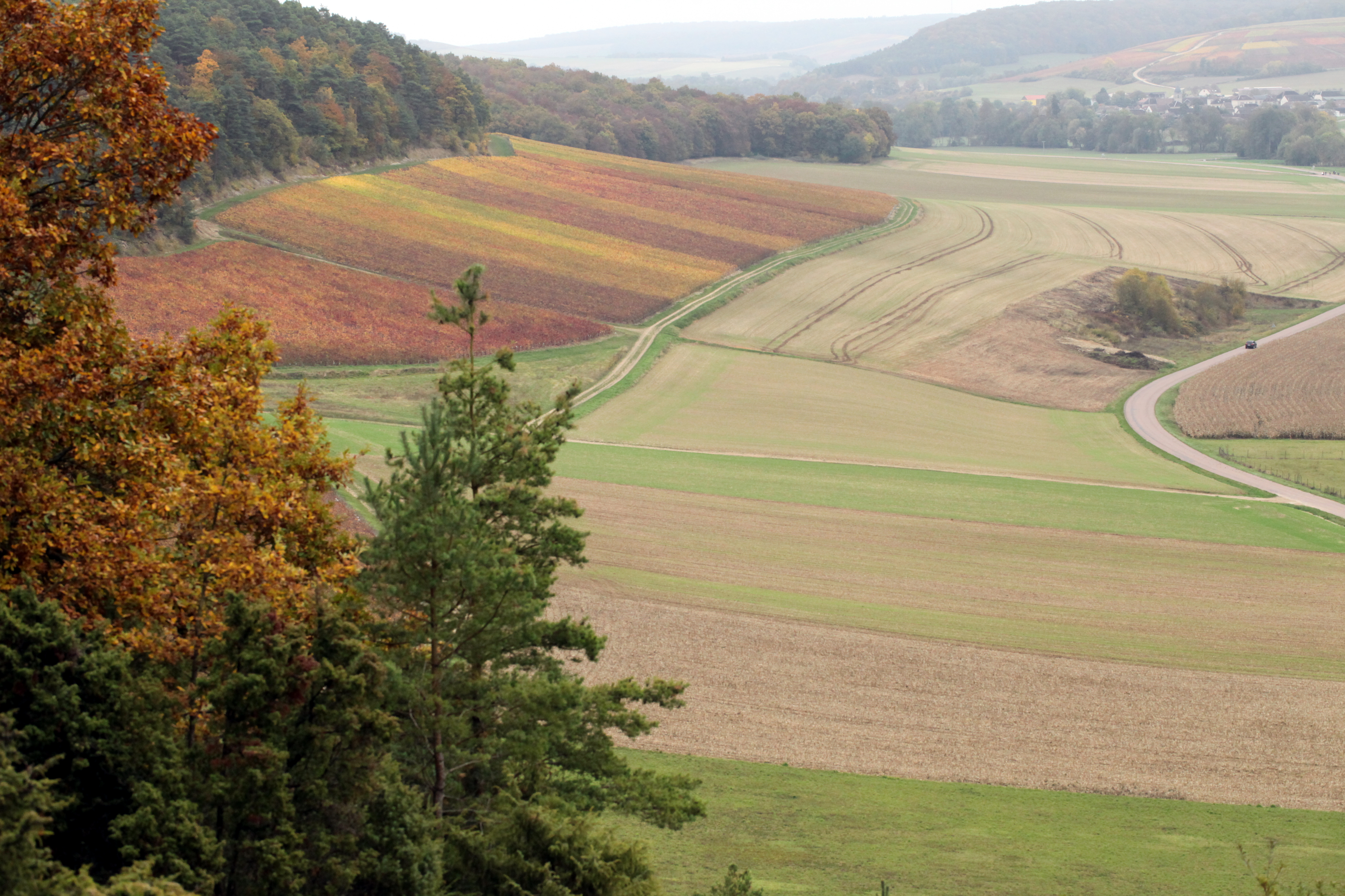 Vignoble à Spoy (Aube).